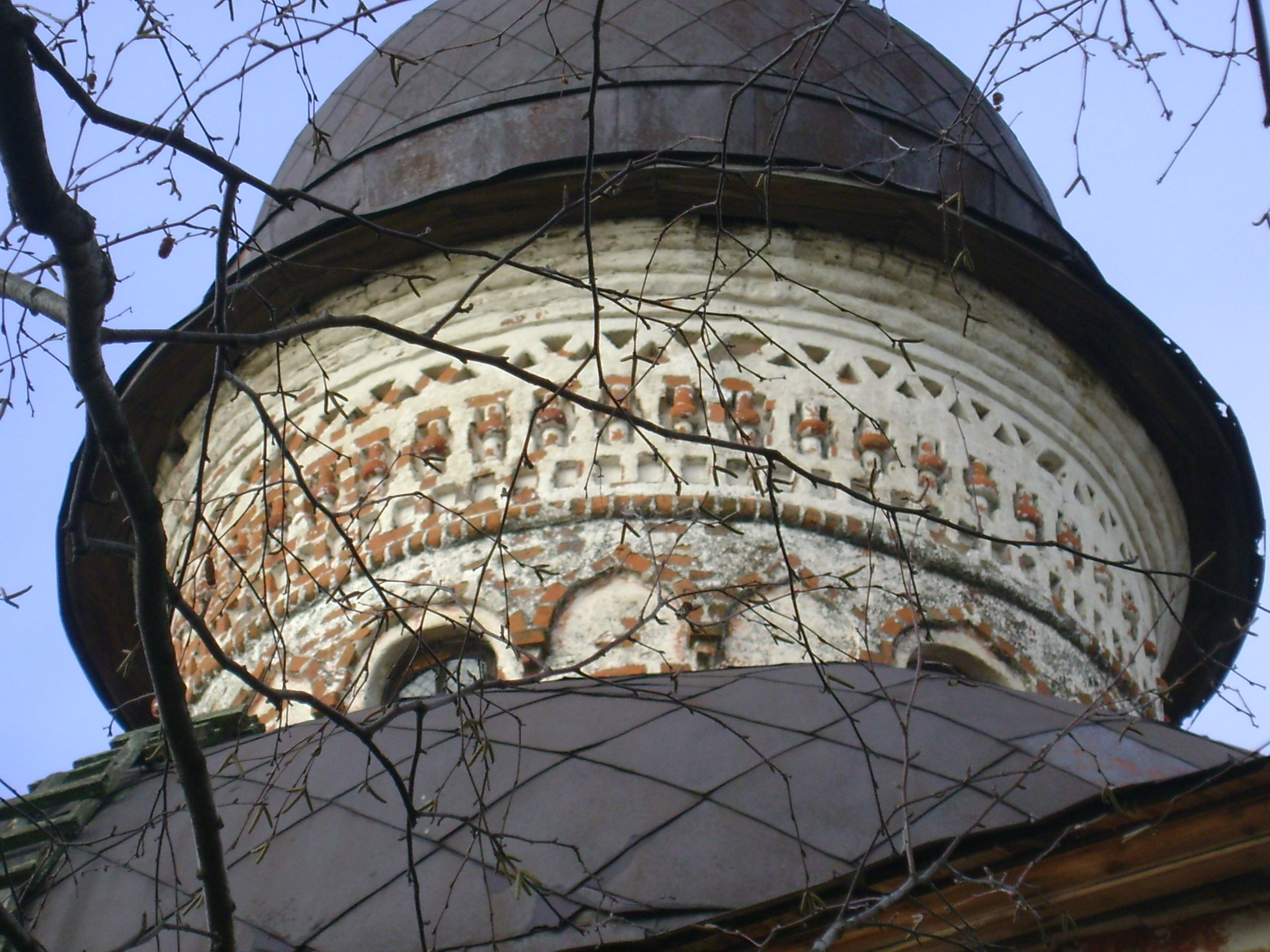 Глава церкви Иоанна Предтечи в Кирилло-Белозерском монастыре